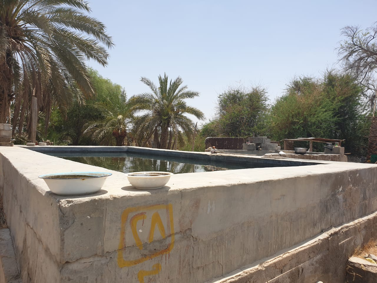 حوض ماء في إحدى مزراع صعراء القديمة